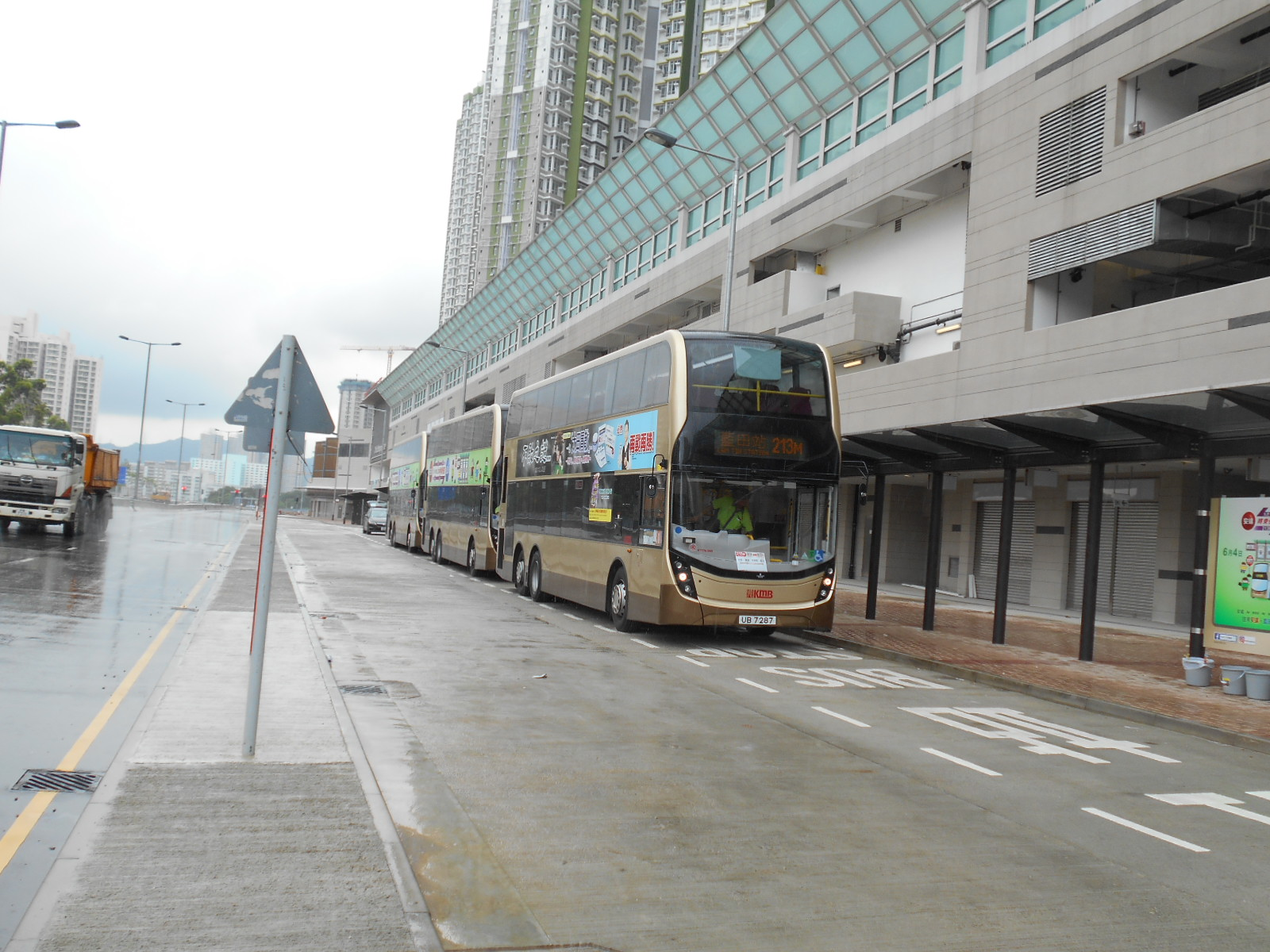 中文（香港）: 安達巴士總站(2016年6月，拍攝時該總站啟用不久)